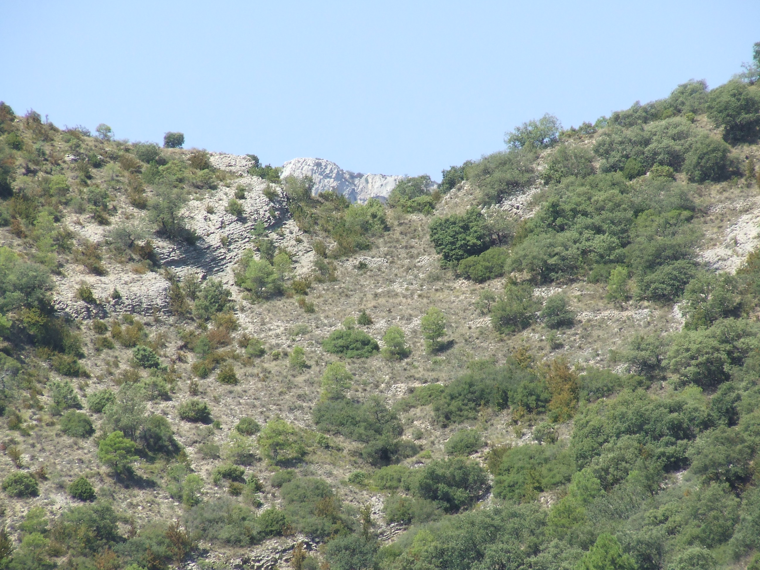 El Coll de Vacamina (Abella de la Conca, Pallars Jussà)